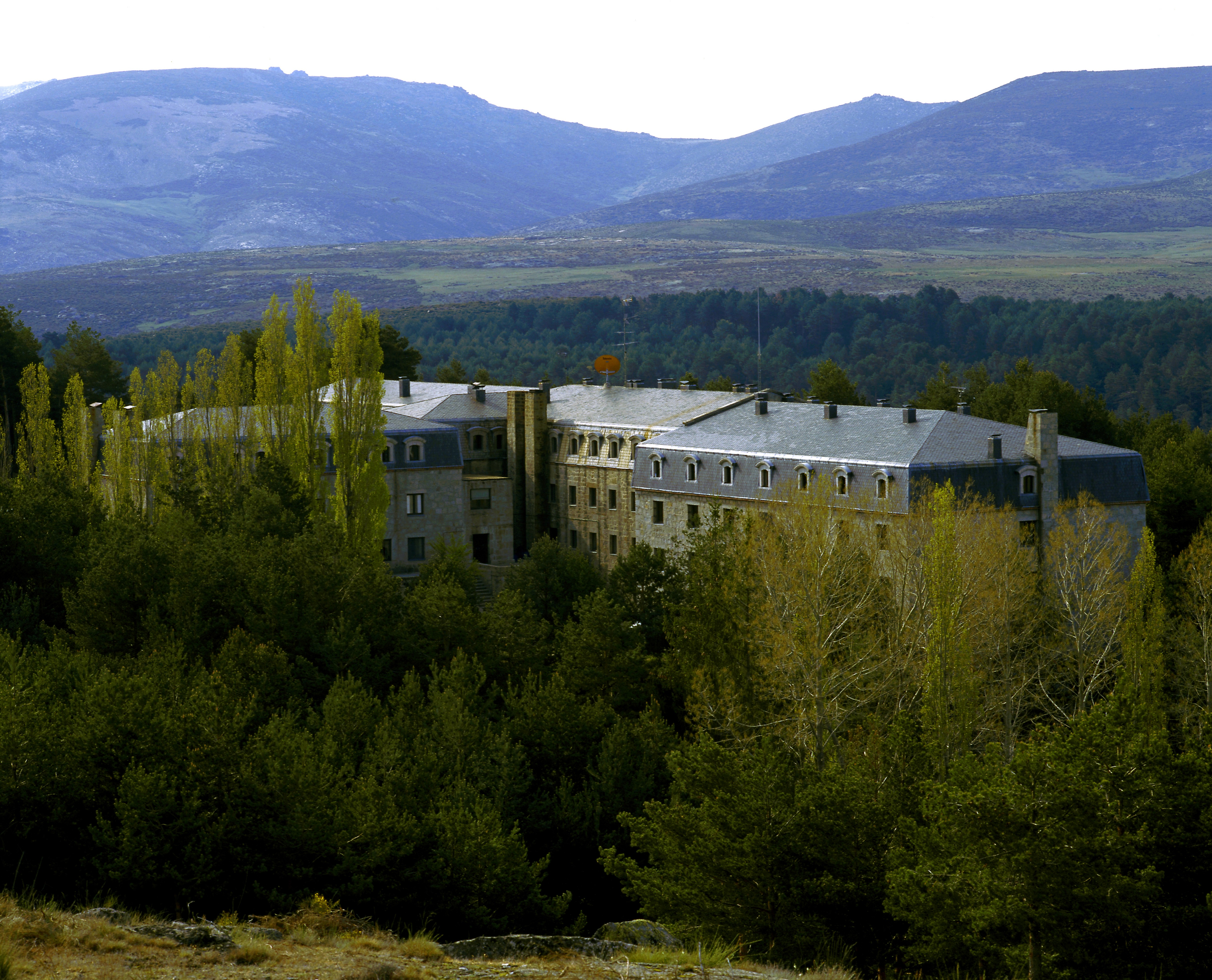 Parador de Gredos